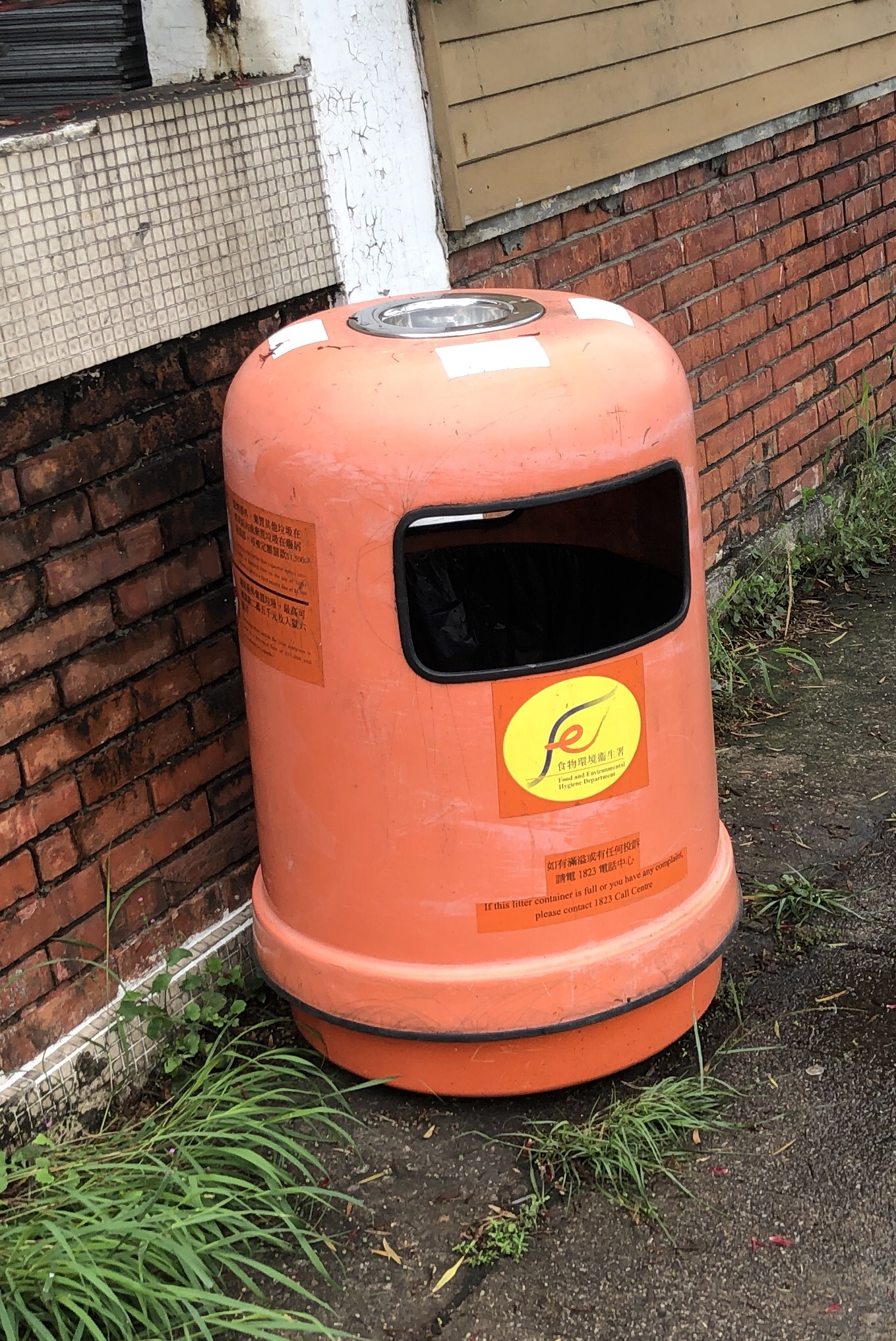 中文（香港）: 香港 燈色 垃圾桶 食物環境衞生署